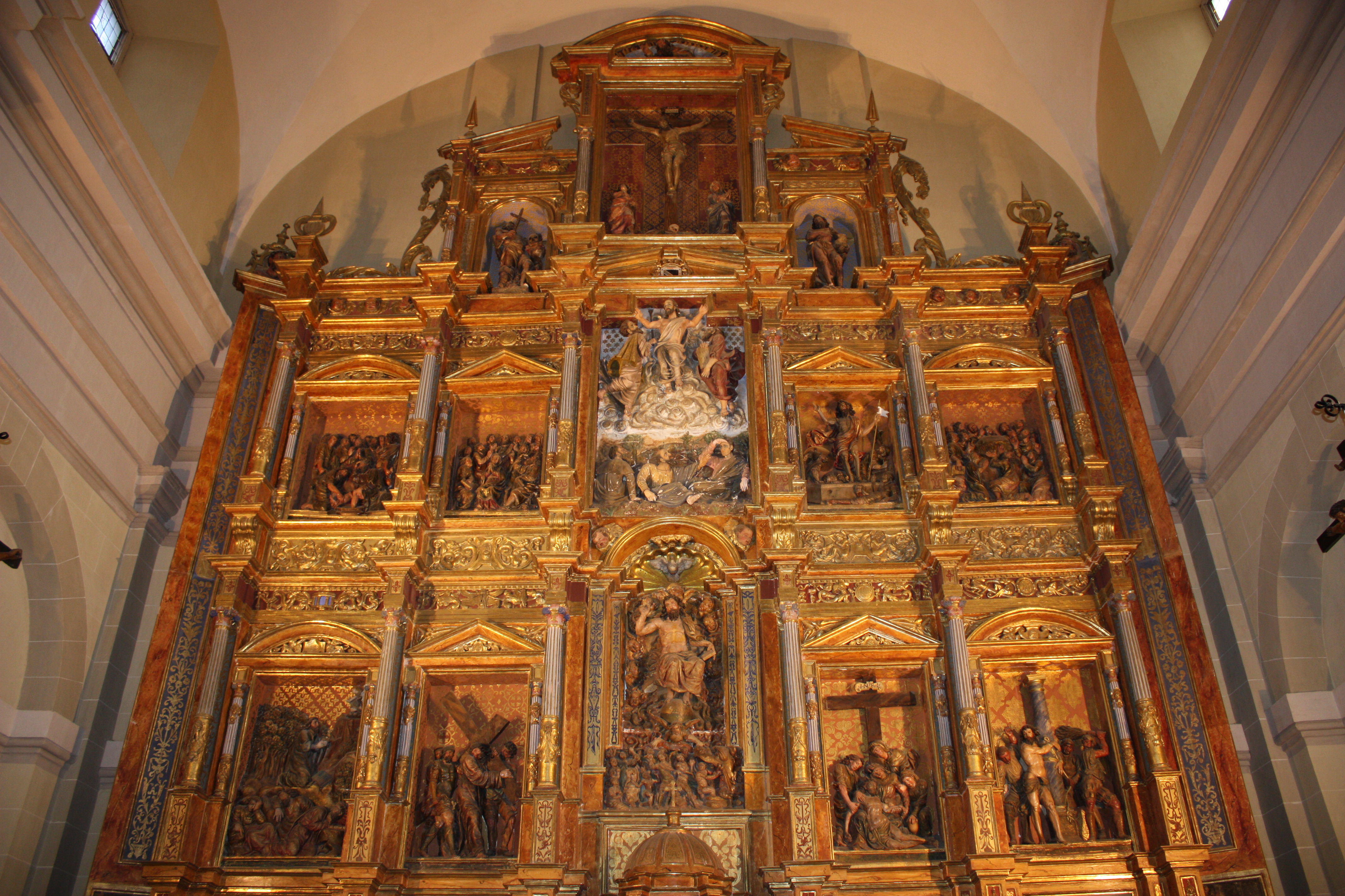 Detalle del retablo dedicado al Salvador que en la actualidad se conserva en la iglesia parroquial de San Pedro Apóstol, en la Plaza Mayor de Valencia de Don Juan. Obra de Guillermo Doncel.